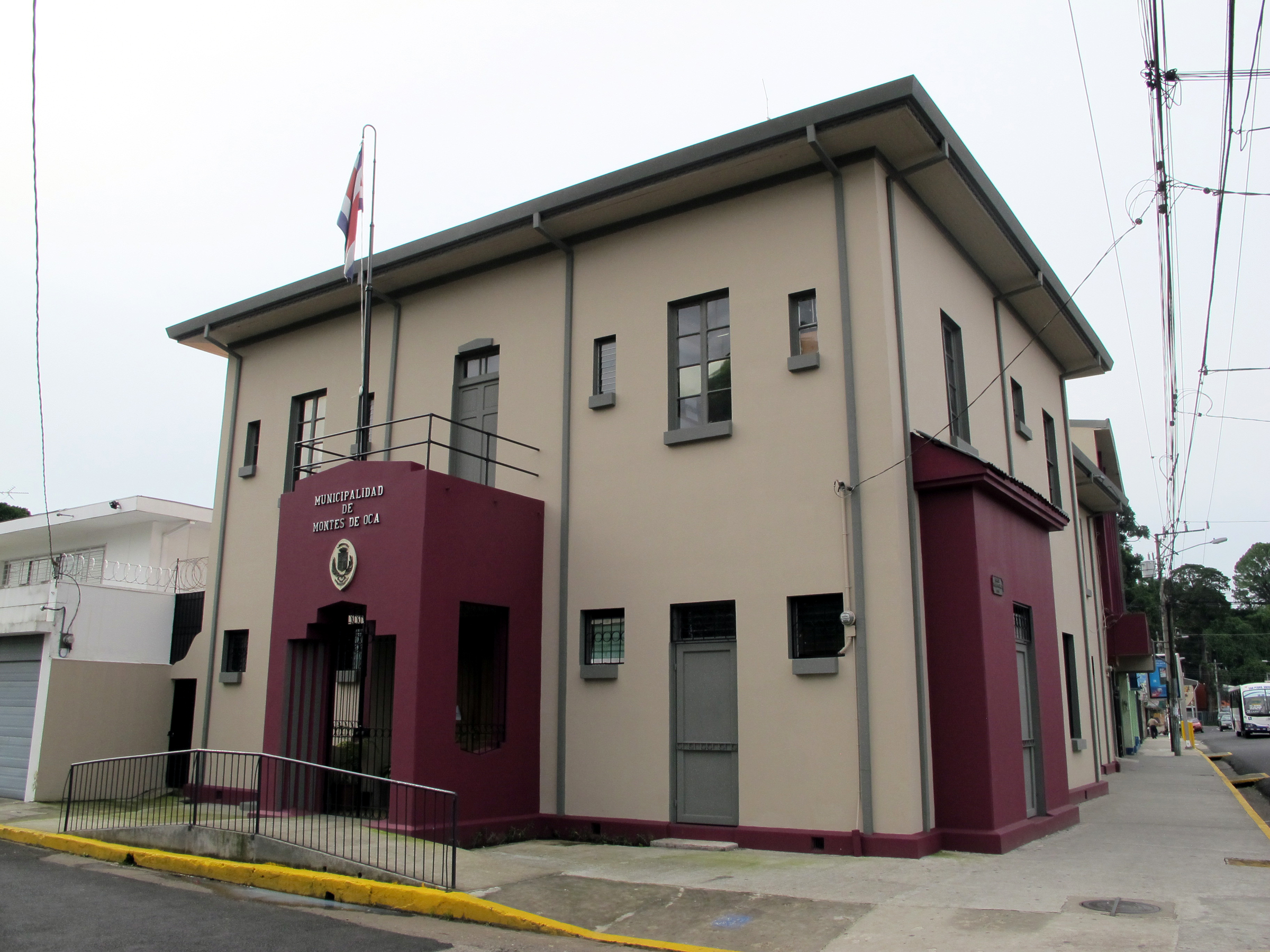 Rådhuset i Montes de Oca kanton i Costa Rica